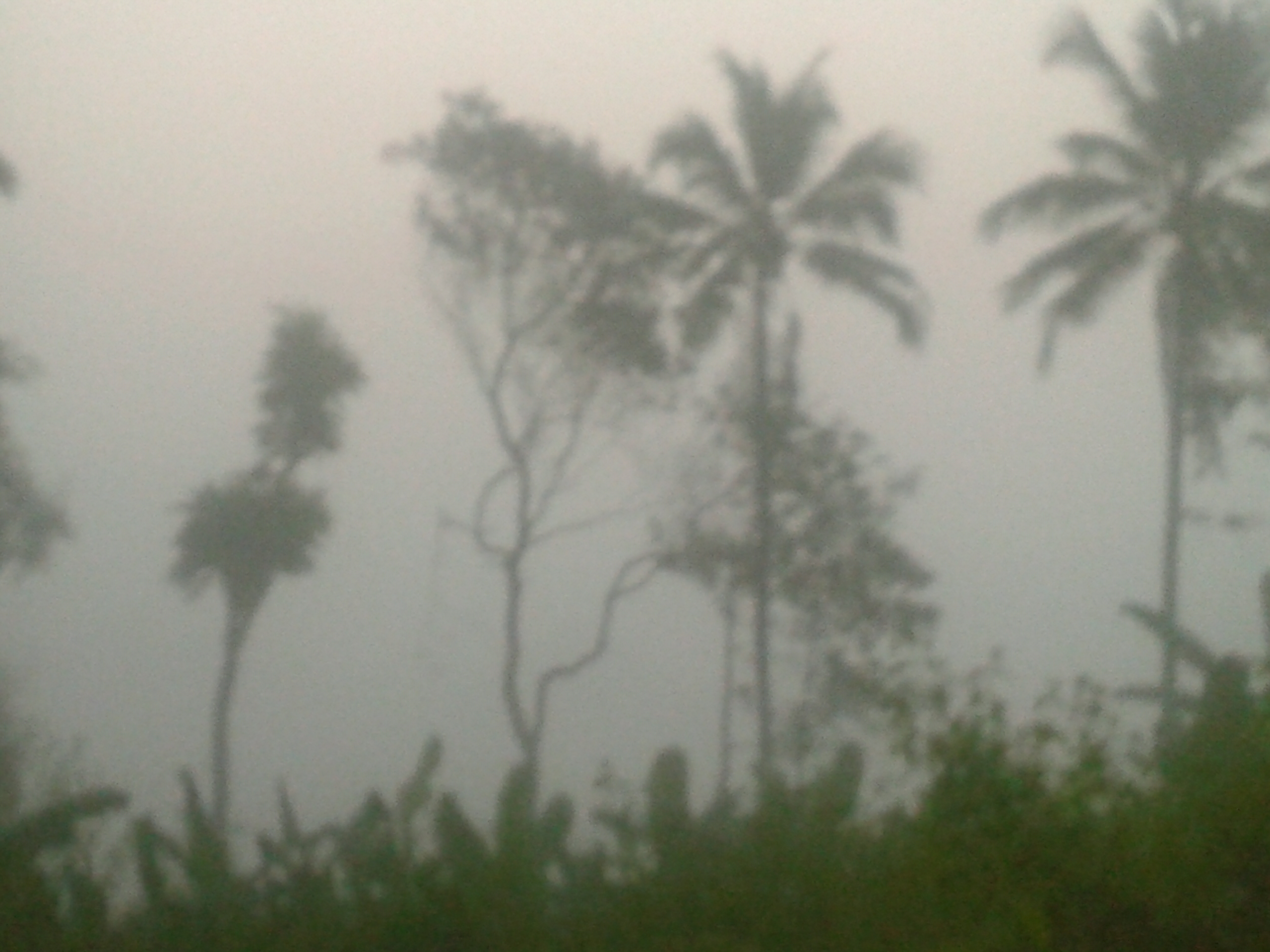 മൂടല്‍ മഞ്ഞ്